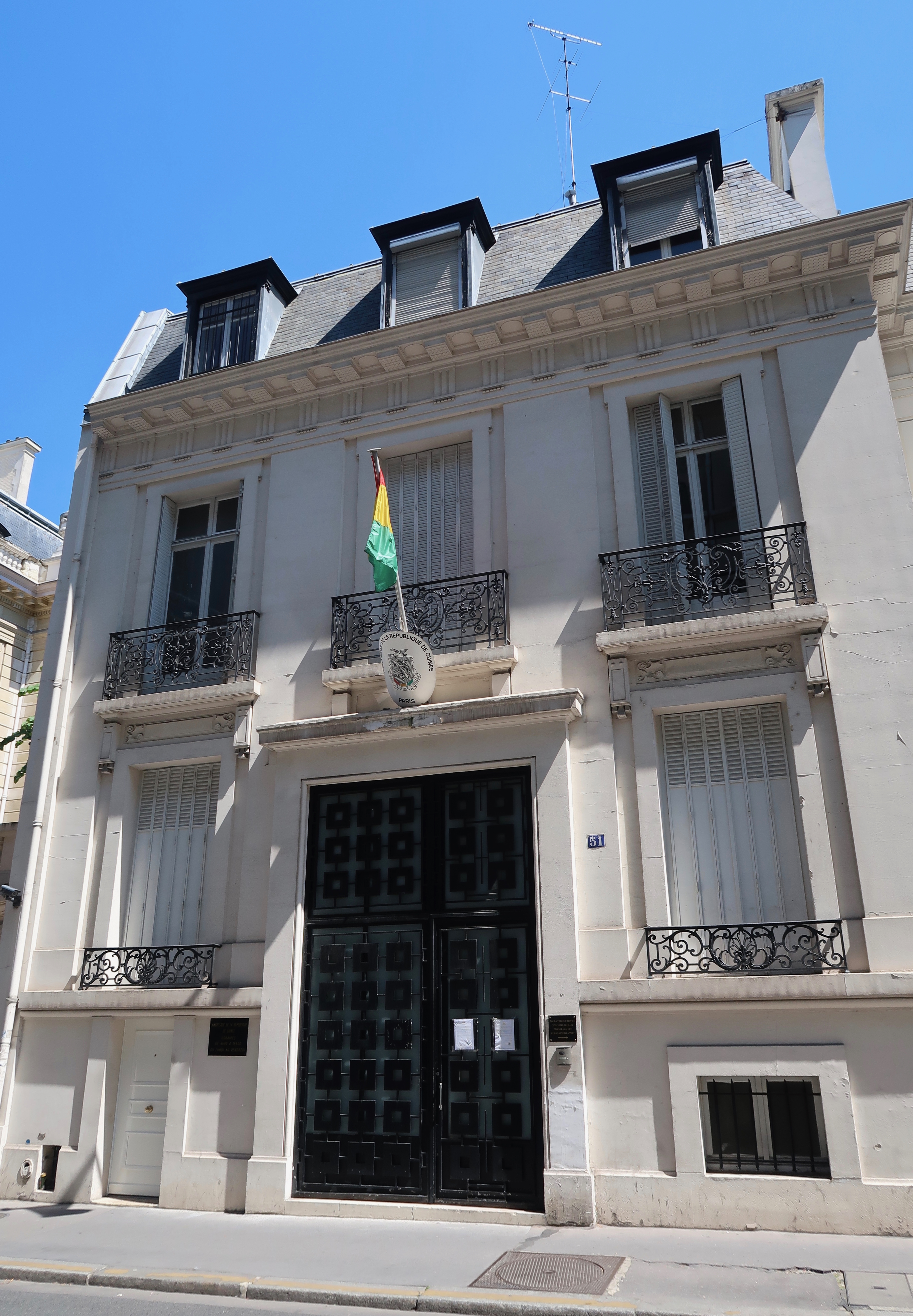 Ambassade de Guinée en France, 51 rue de la Faisanderie (Paris, 16e).